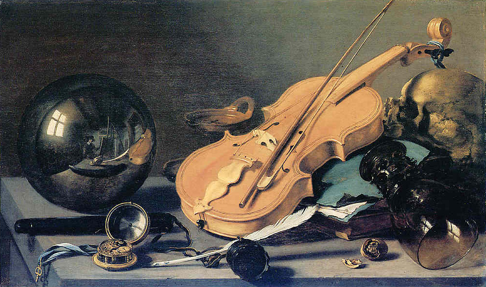 Auf der Tischplatte eines schräg ins Bild ragenden Holztisches vor dunklem Hintergrund liegen verschiedene Gegenstände. In der Spiegelung in der Glaskugel wird der Raum des Malers gezeigt, in dem dieser vor seiner Staffelei sitzt. In der Mitte des Bildes, liegt eine wegen der der doppelten Randeinlage flämische Geige mit Steckfroschbogen auf einem Bücherstapel. Rechts davon ist ein Totenschädel und ein umgestürzter Römer mit Noppenschaft, daneben eine aufgebrochene Walnuß. Hinter dem Musikinstrument steht eine Öllampe, vorne links liegt eine Uhr mit Schlagwerk. Darum ist ein Tintengefäß, eine Schreibfeder und ein Lederetui gruppiert. Der Schlüssel der Uhr und die Schreibutensilien überragen die Tischkante.